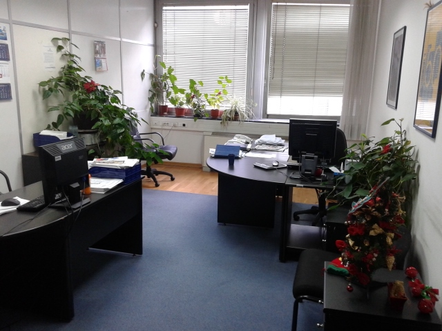 Kancelarija u Makedonskoj 4.